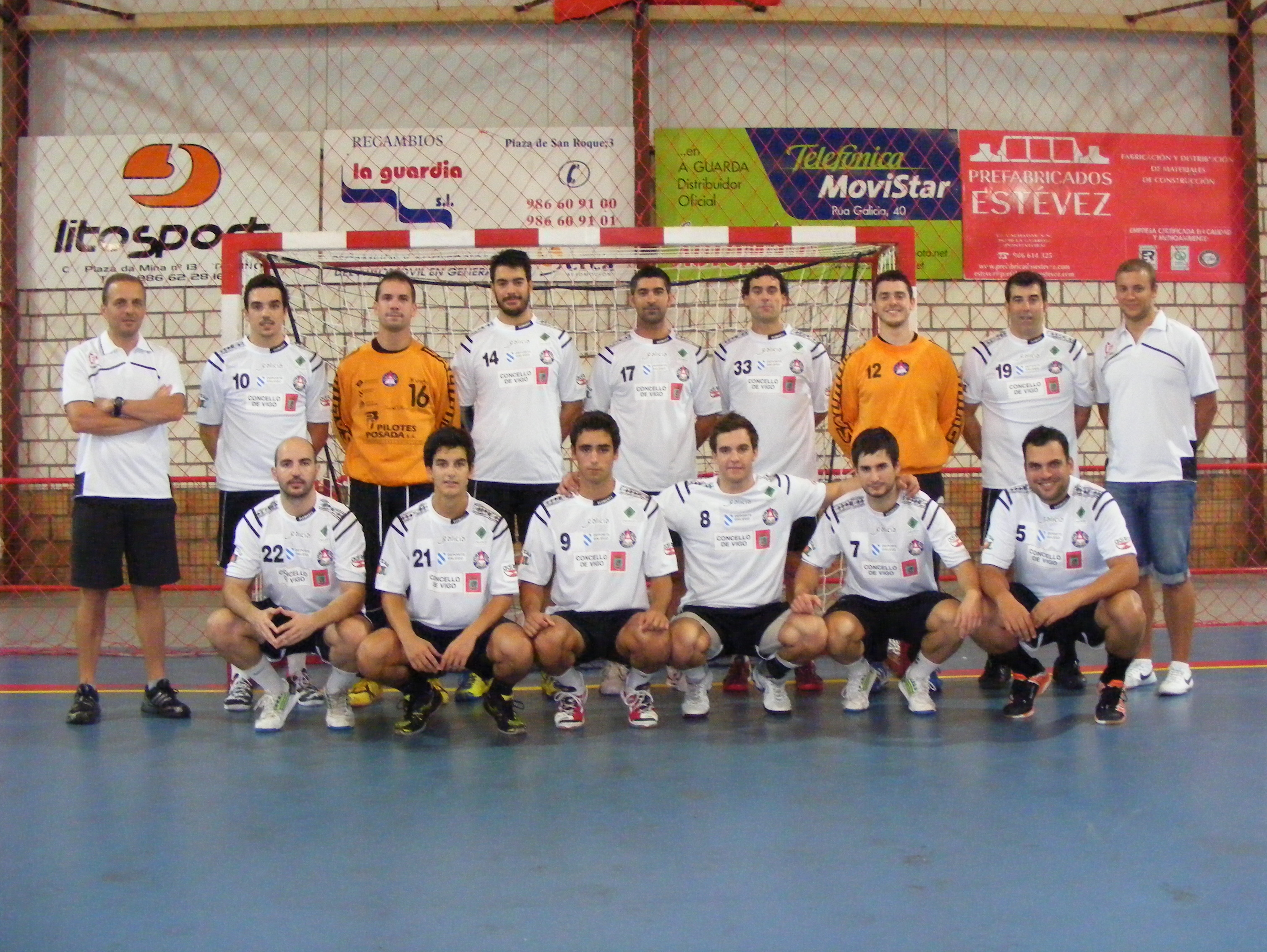 Academia Octavio en el Torneo Concello do Rosal 2013.